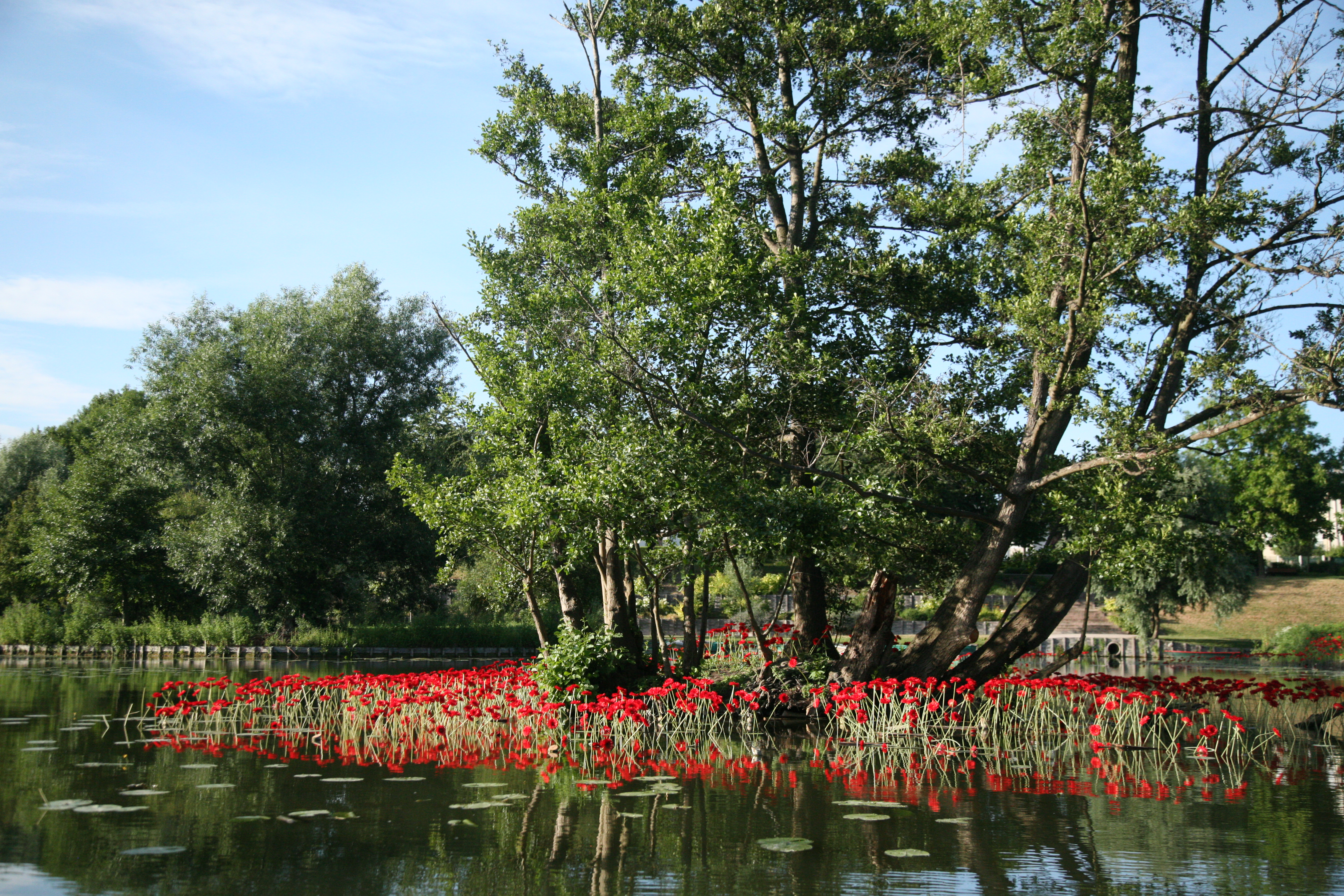 Les hortillonnages d'Amiens en 2010